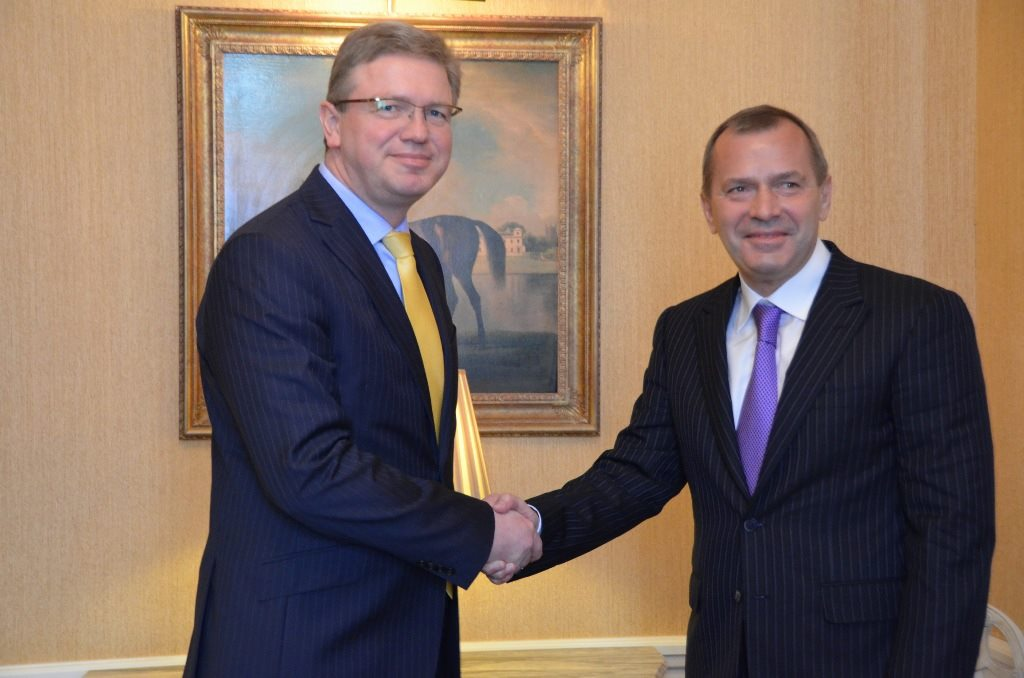 Секретар РНБОУ Андрій Клюєв та Комісар ЄС з питань розширення Штефан Фюле. 24.04.2013